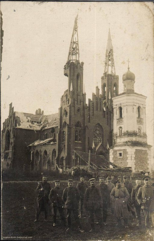 Троіцкі касцёл, Відзы